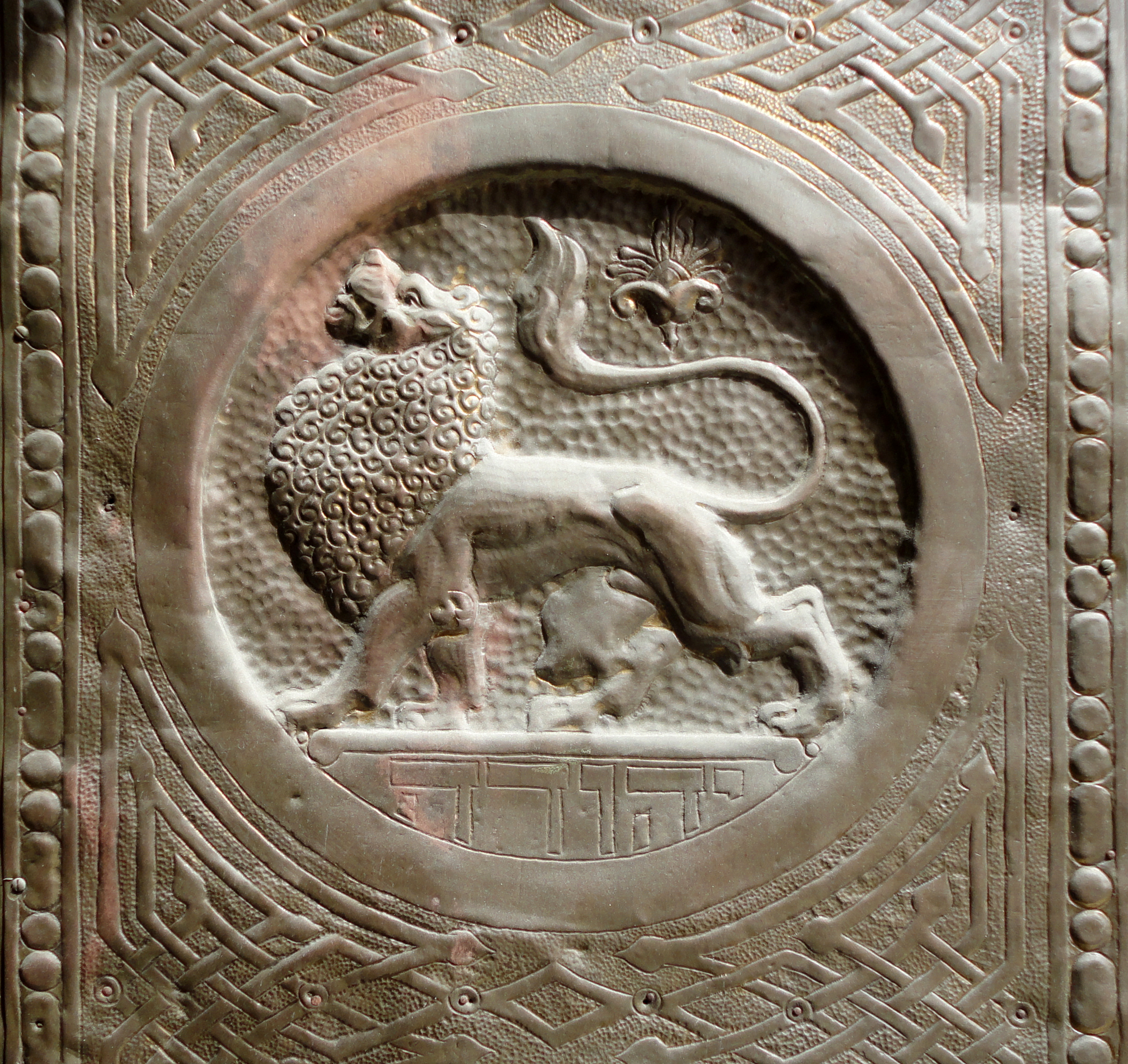 בית החולים ביקור חולים הוא בית חולים שנוסד באמצע המאה ה-19 בעיר העתיקה בירושלים, ועבר בשנת 1925 למושבו ברחוב הנביאים פינת רחוב שטראוס, שם הוא שוכן ופועל היום.